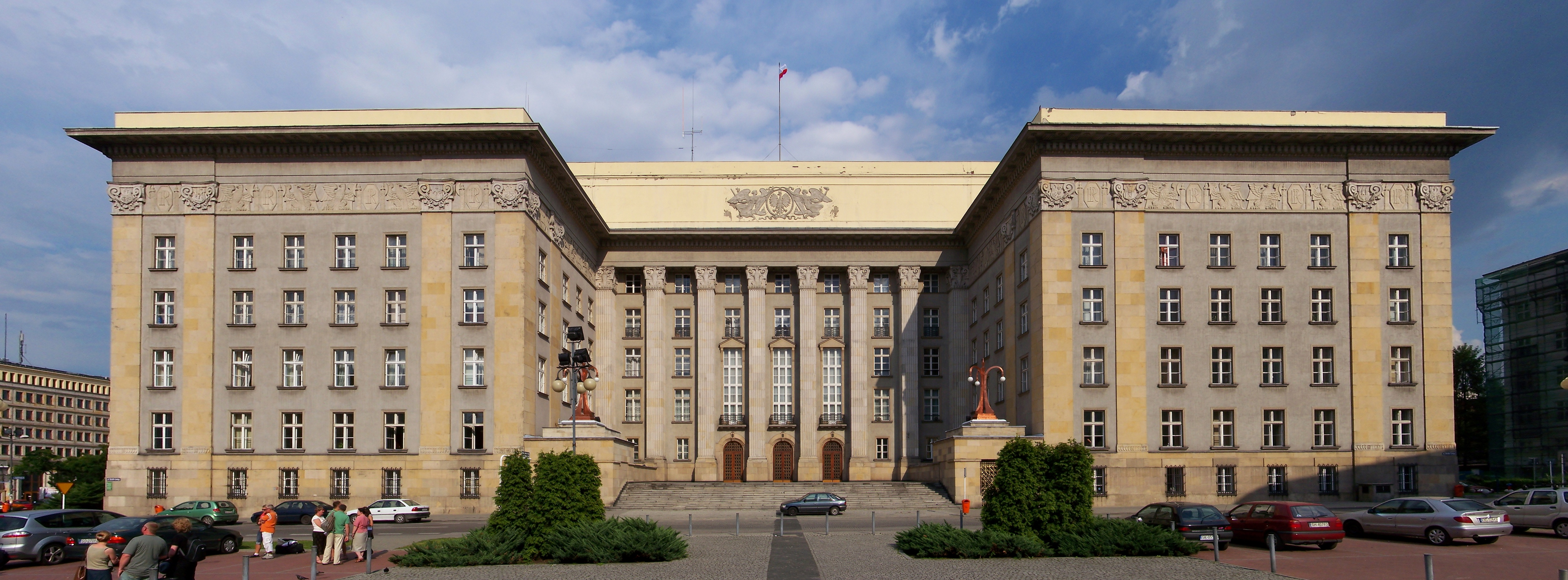 Der Schlesische Landtag in Kattowitz.